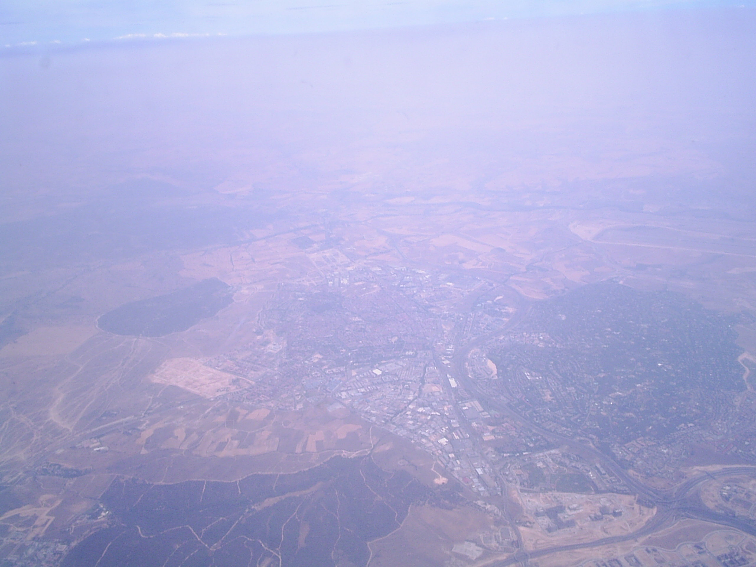 San Sebastián de los Reyes y Alcobendas desde un avión.